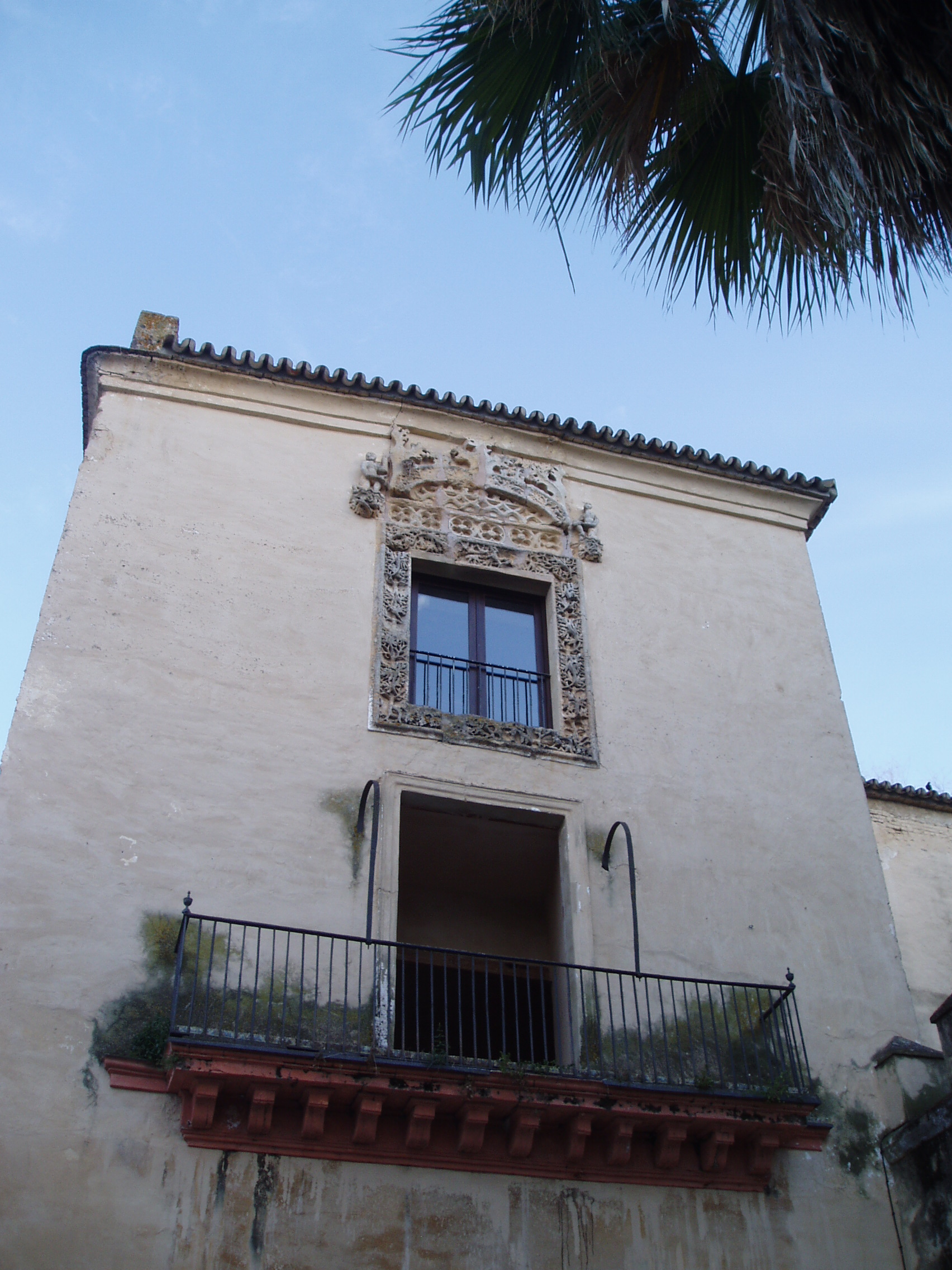 Palacio renacentista de los Ribera en Bornos (provincia de Cádiz).